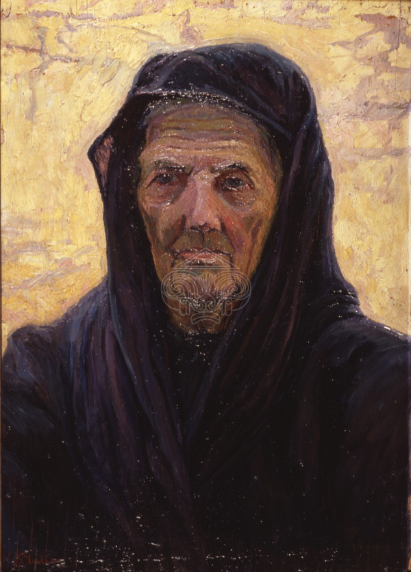 Old lady portrait